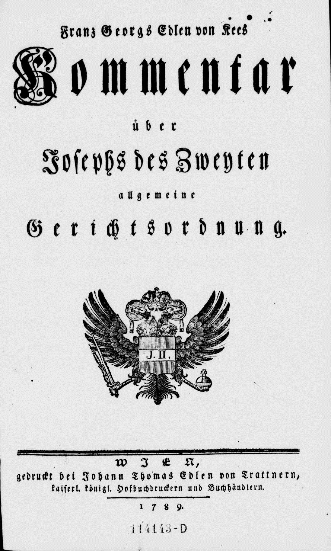 Frontespizio